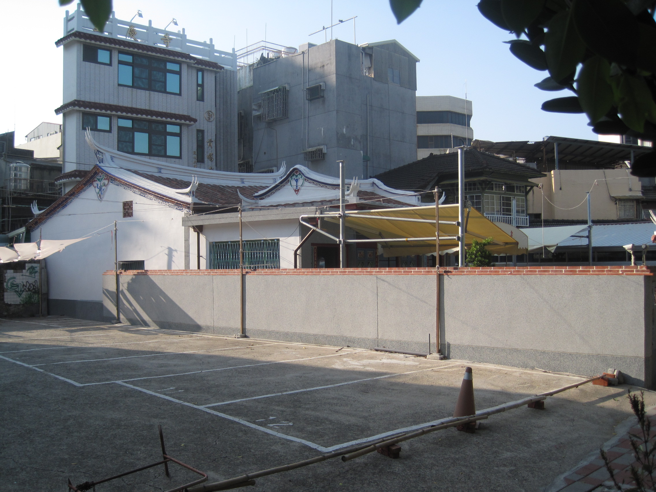 2014年所拍攝之整修後的重慶寺外觀